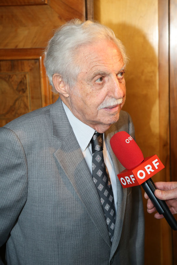 Gerald Bast, Carl Djerassi-8581